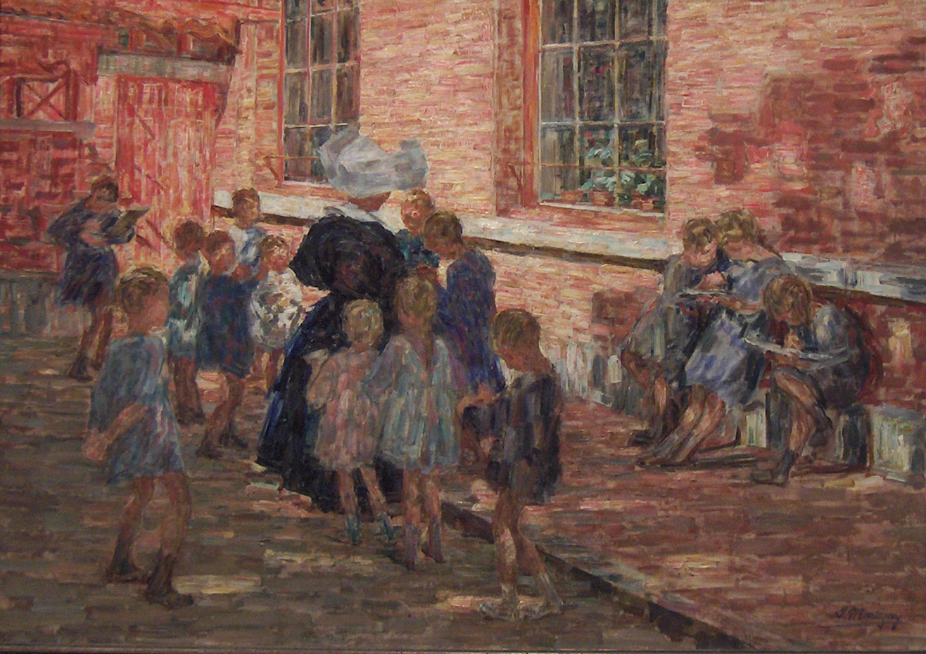 "Kleuterschool te Deurle"; olieverf op doek door Jenny Montigny (1875-1937); 85 x 120 cm Museum van Deinze en de Leiestreek, België